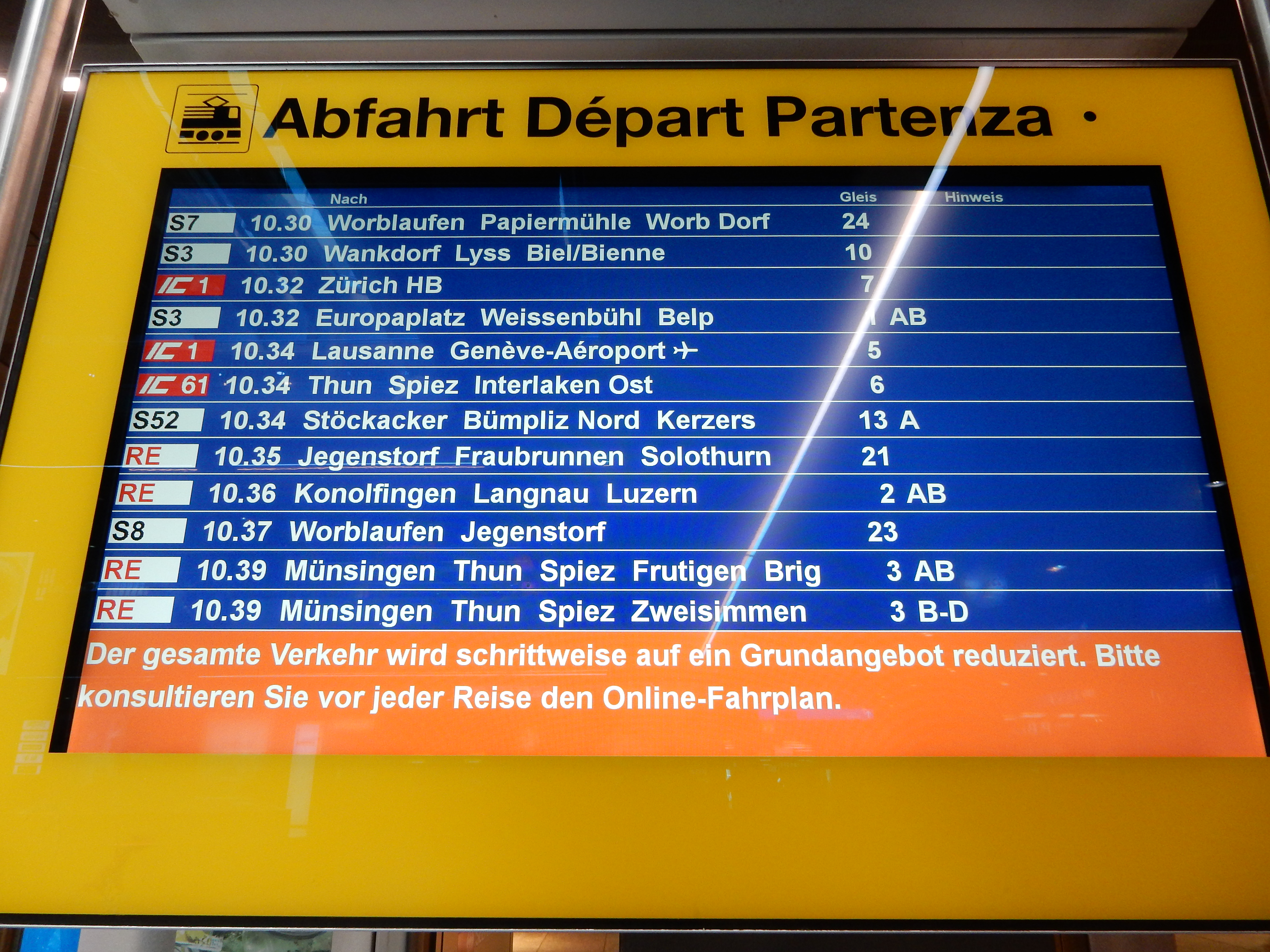 COVID-19 Reduzierter Bahnbetrieb SBB Schweiz. Abfahrtstafel mit dem Hinweis: "Der gesamte Verkehr wird schrittweise auf ein Grundangebot reduziert. Bitte konsultieren Sie vor jeder Reise den Online-Fahrplan."